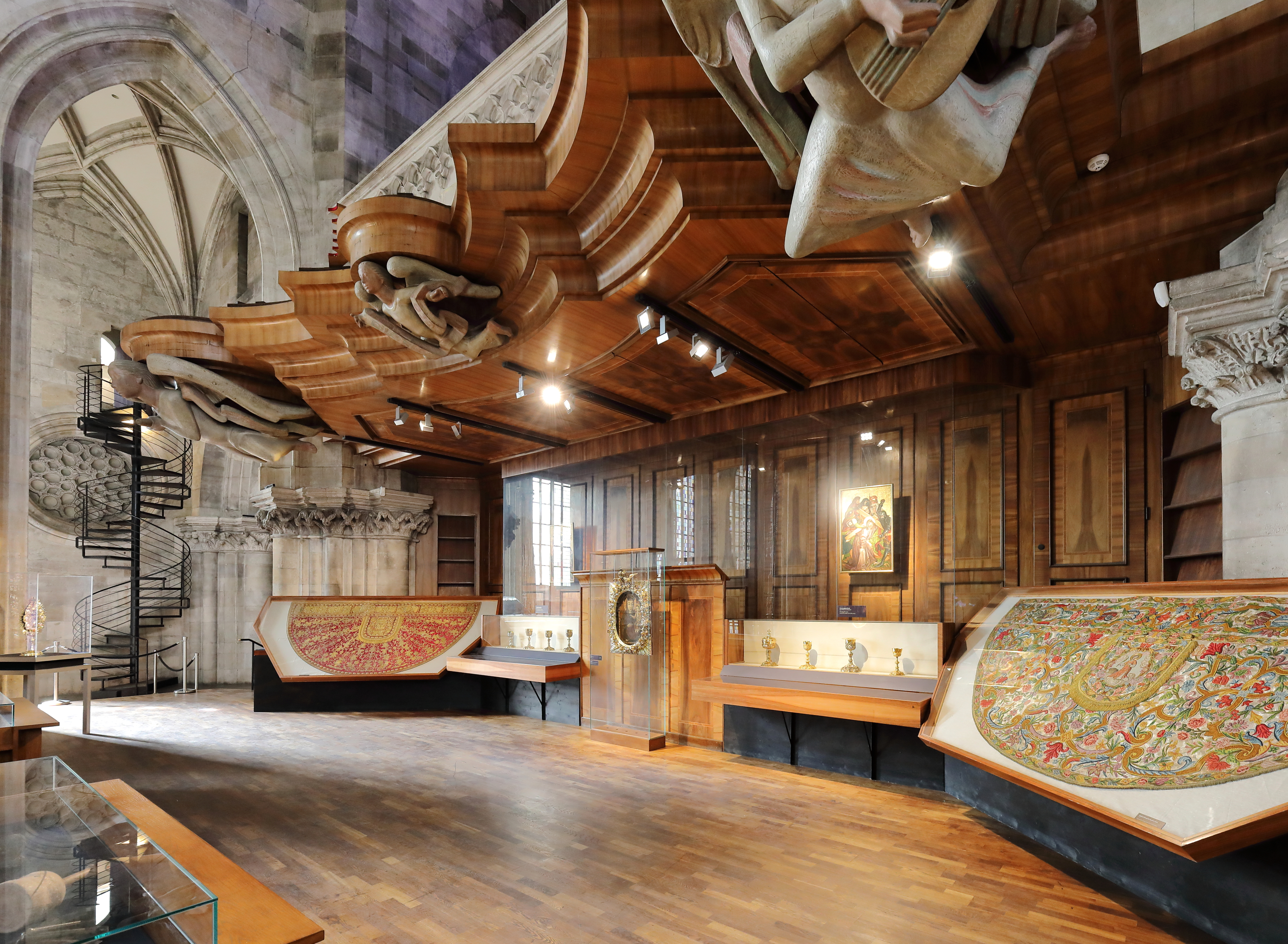 Exponate des Domschatzes von St. Stephan auf der Westempore des Stephansdoms mit Blick in Richtung Bartholomäuskapelle in der österreichischen Bundeshauptstadt Wien. Links im Hintergrund die Rundstiege zur Bartholomäuskapelle.